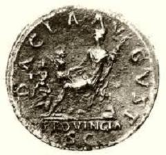 Médaille frappée par les Romains à l'occasion de la fondation de la province de Dacie. IIe siècle ap. J-C. (Collection de monnaies du Musée National de Hongrie, Budapest).